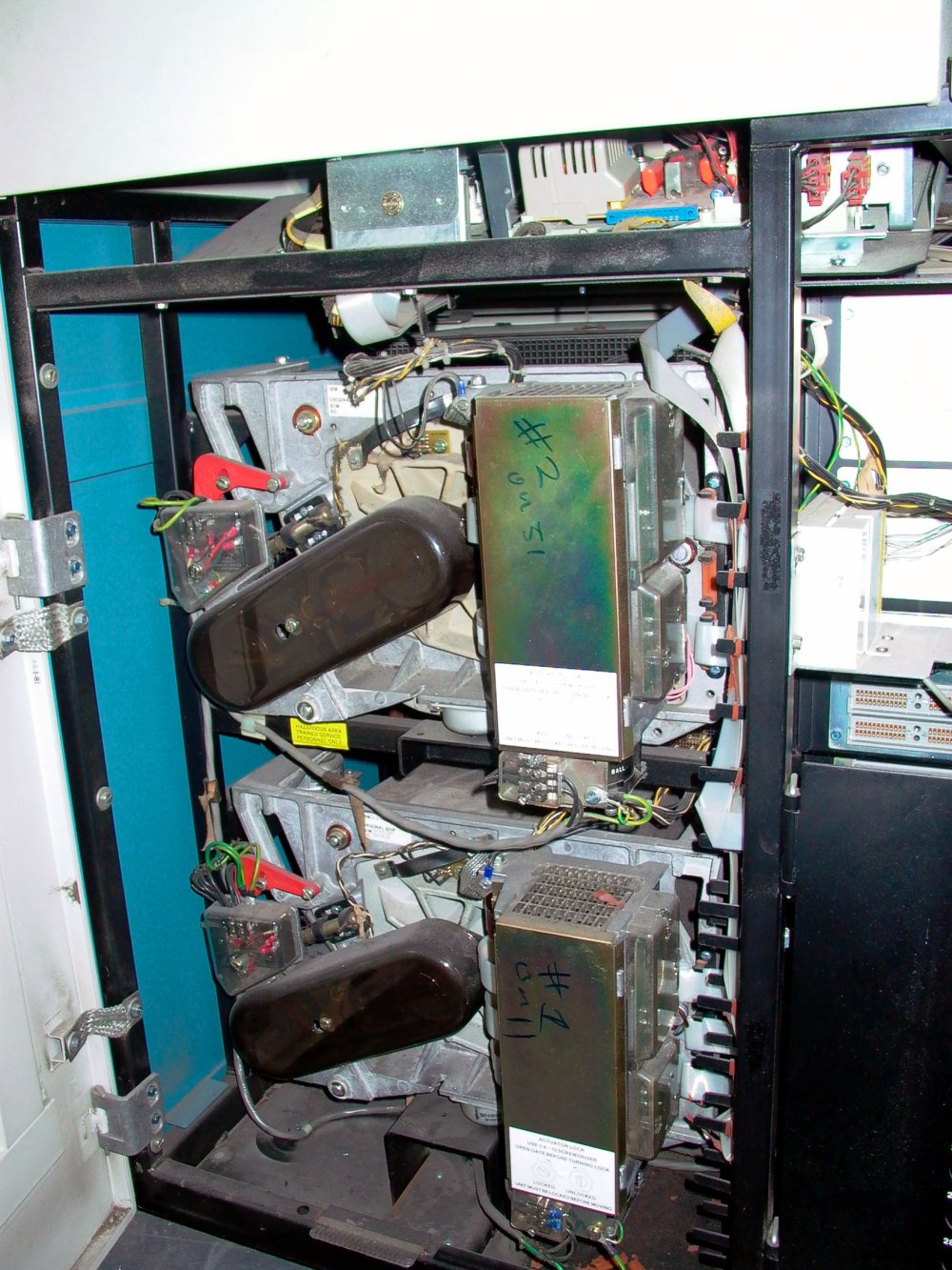 Bildbeschreibung: IBM System/38 Festplatten Quelle: Fotograf/Zeichner: Mike Ross Datum: 19.01.2006